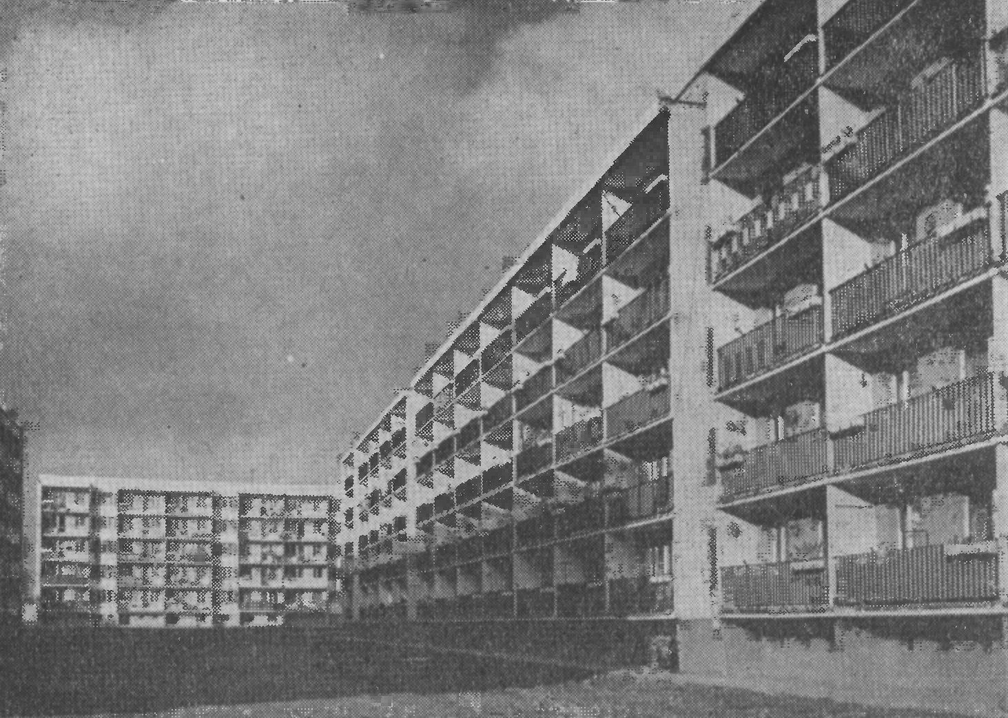 os. Rzeczypospolitej. Z prawej - bud. nr 27 (elewacja zach.) z 1971; w głębi - bud. nr 25 z 1970